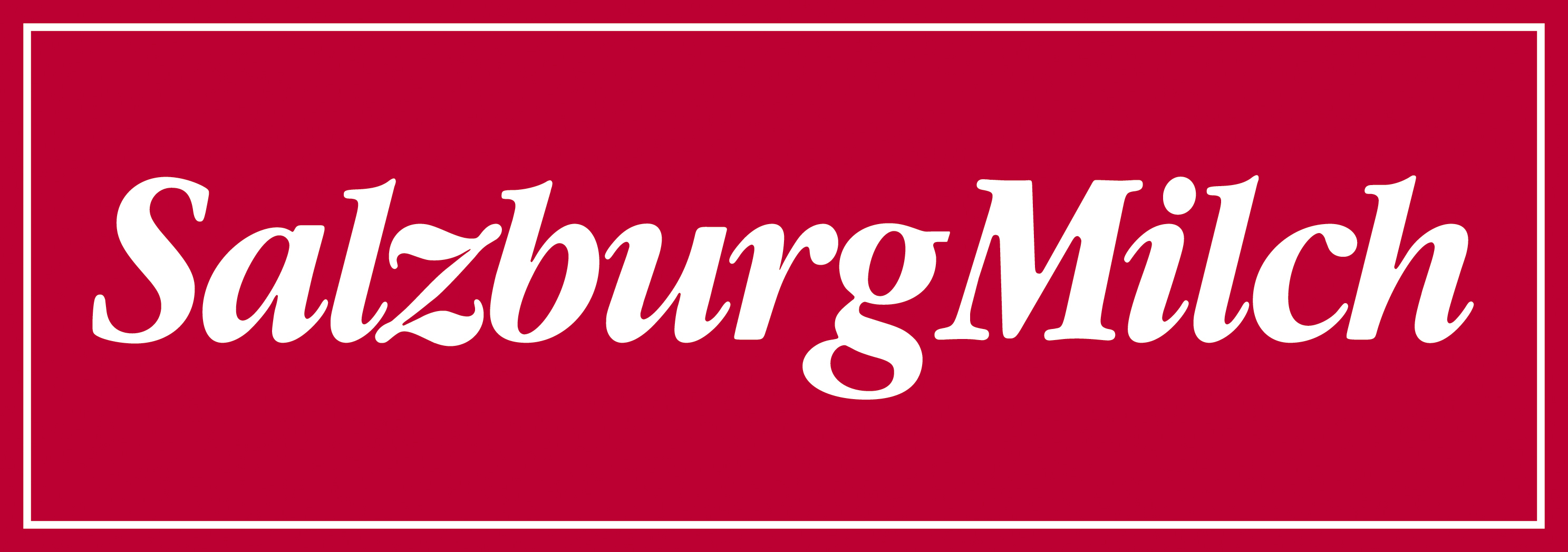 Logo SalzburgMilch